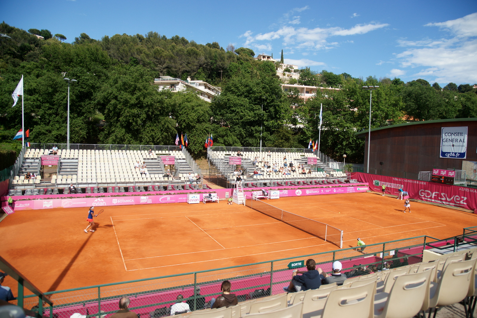 vue du court central Open Cagnes-sur-Mer 2014